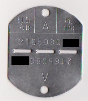 Erkennunungsmarken des österreichischen Bundesheer